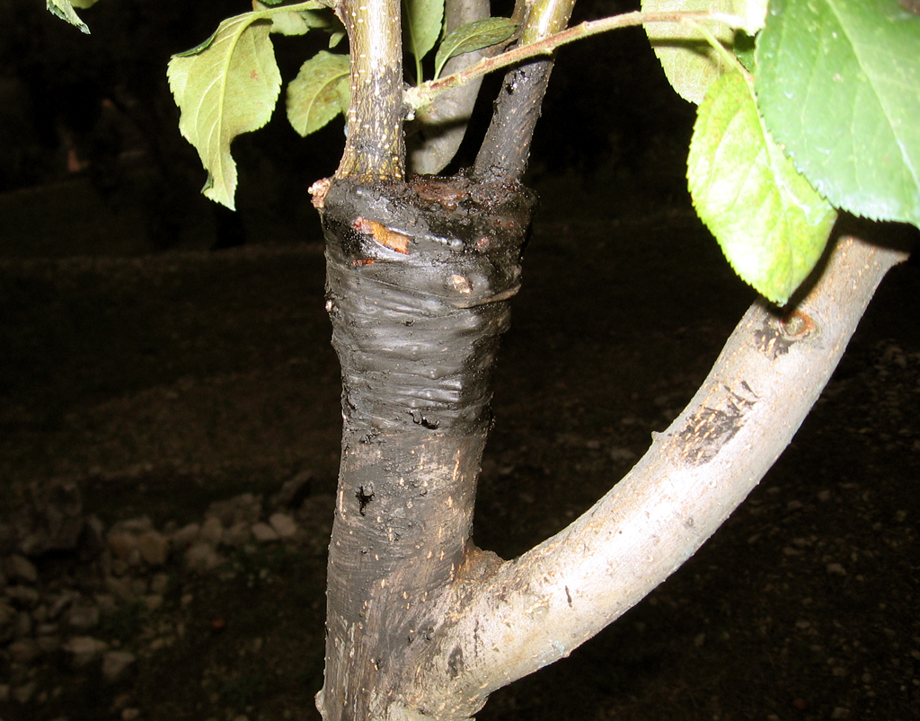 Innesto Particolare dell'innesto terminato Autore: Paolo Ciarlantini